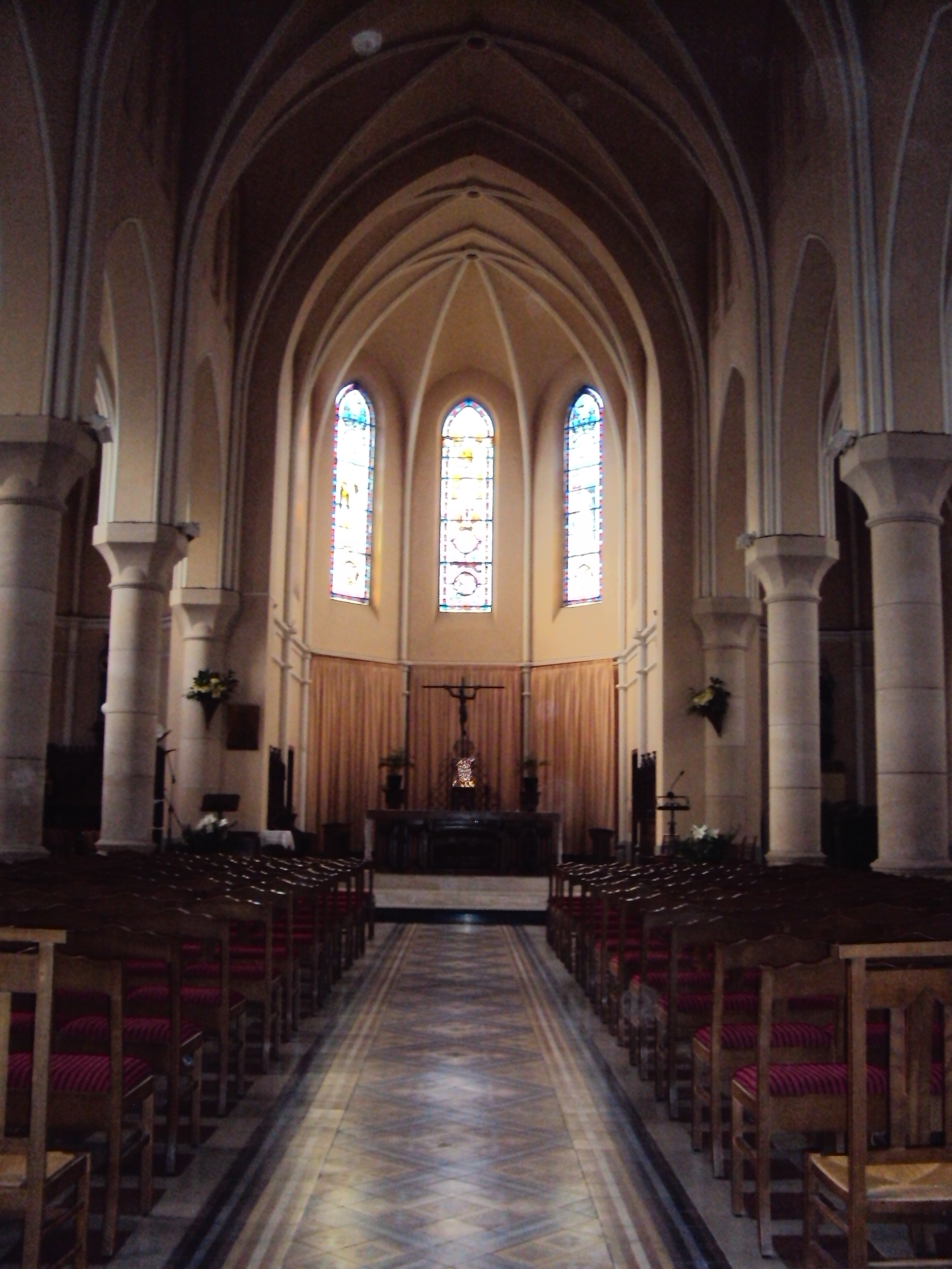 Nef de l'église Sainte-Geneviève à Marquillies (Nord, France).